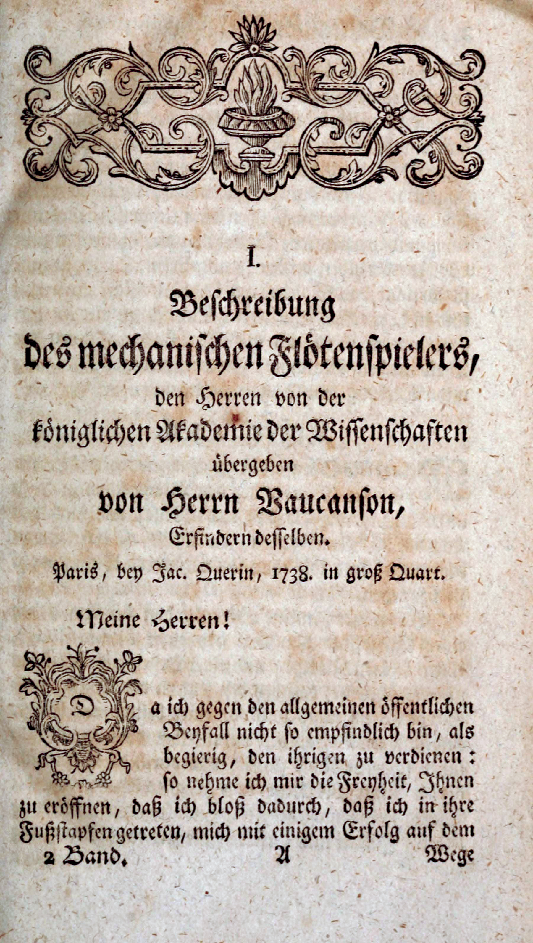 Page from Hamburgisches Magazin, oder gesammlete Schriften, aus der Naturforschung und den angenehmen Wissenschaften überhaupt